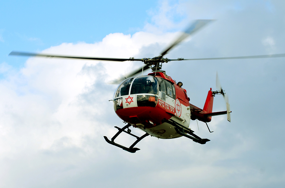 אמבולנס מעופף - מגן דוד אדום